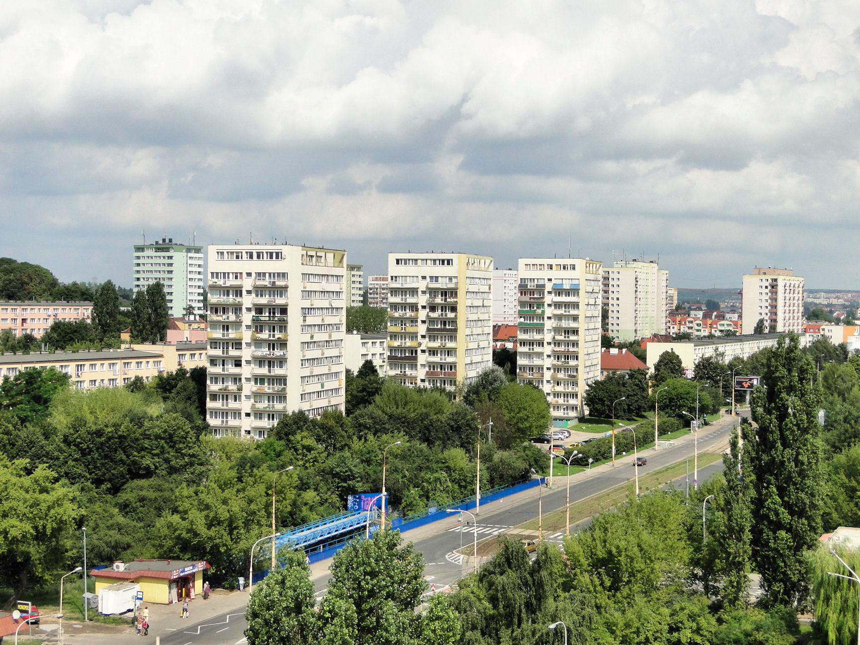 Osiedle Wzgórze Hetmańskie na Pomorzanach w Szczecinie